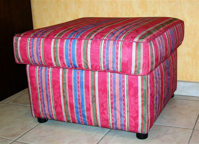 Eigen werk. Gemaakt op 21-01-2007